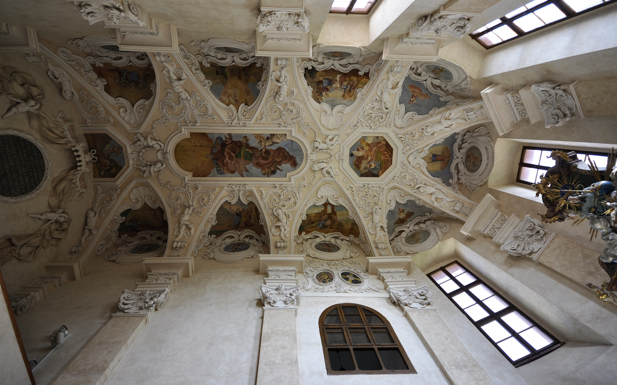 Zámek Nový hrad, Jimlín 220, Jimlín.